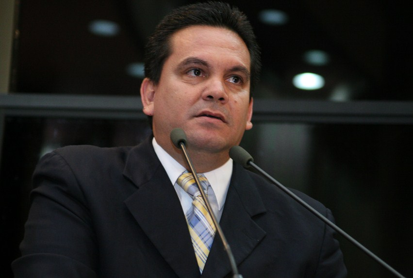 Enrique Reina Lizárraga (Pitiquito, Sonora, 12 de agosto de 1969) es un político mexicano, militante del Partido Acción Nacional. Fue alcalde de San Luis Rio Colorado 2000 - 2003, Dirigente del PAN en Sonora 2005 – 2009 y coordinador del Grupo Parlamentario del PAN en el Congreso del Estado de Sonora para el periodo de 2009 a 2012. Actualmente es candidato a diputado federal por el distrito 1.